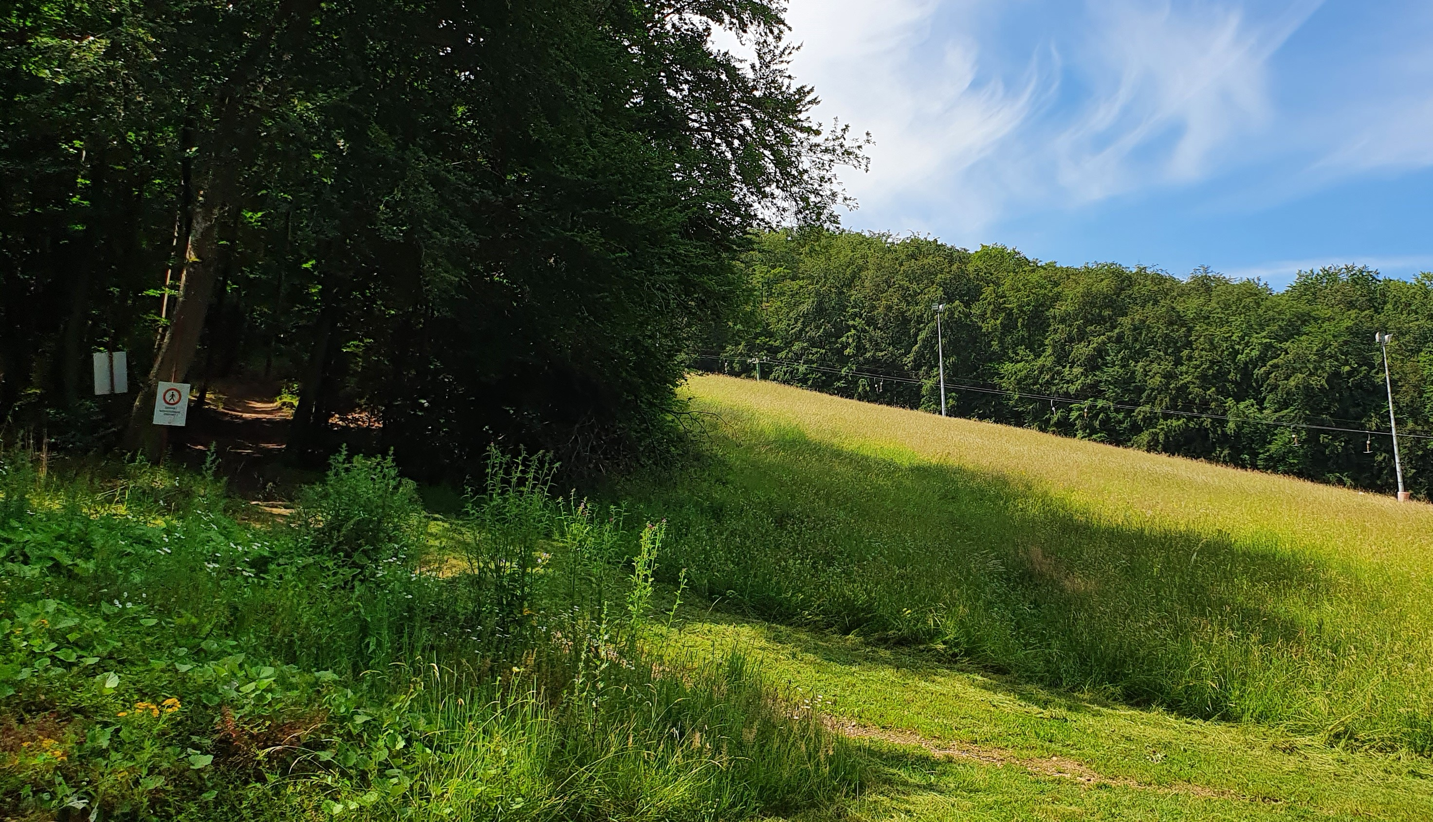 Blick von Westen auf den im Sommer von Mountainbikern genutzten Heidenheimer Hochberg mit Skilift